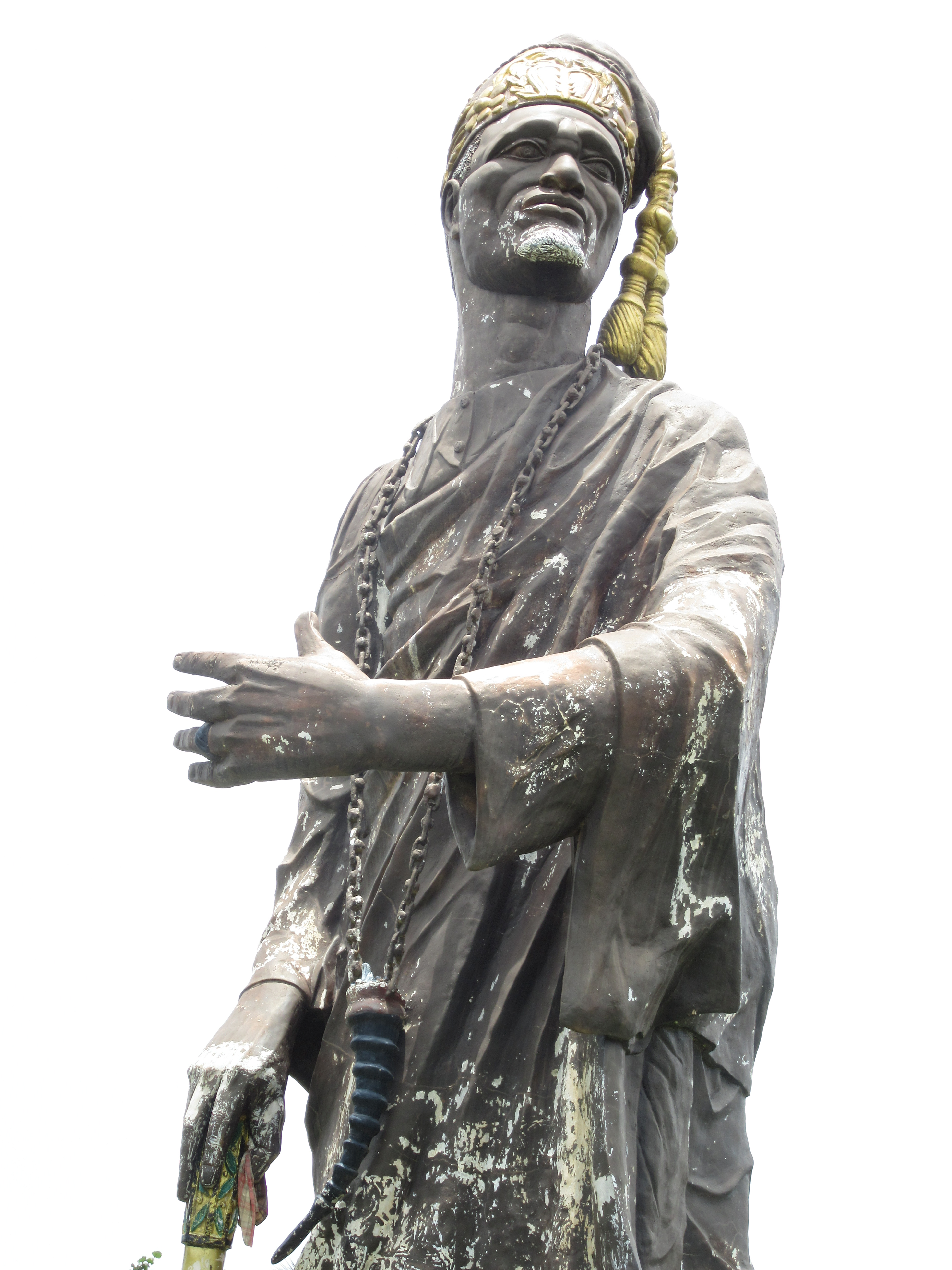 En plein centre-ville de la capitale Porto Novo se dresse la statue du roi Toffa 1er. Celui-ci règna, de 1874 à 1908, à Xogbonu, ancien nom de Porto Novo. Pour promouvoir son royaume et nettement se séparer de Glèlé et de la dynastie des rois d'Abomey, il s'associa avec la France, et en 1882 s'instaura le protectorat français. Toffa vit son royaume prospérer économiquement et culturellement ; sa capitale Porto Novo devint celle de la colonie du "Dahomey et dépendances" avec édification du Palais du Gouverneur, mais son pouvoir personnel était de plus en plus rogné. Wikidata has entry Q66486611 with data related to this item.